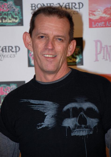 Actor Ezra Buzzington